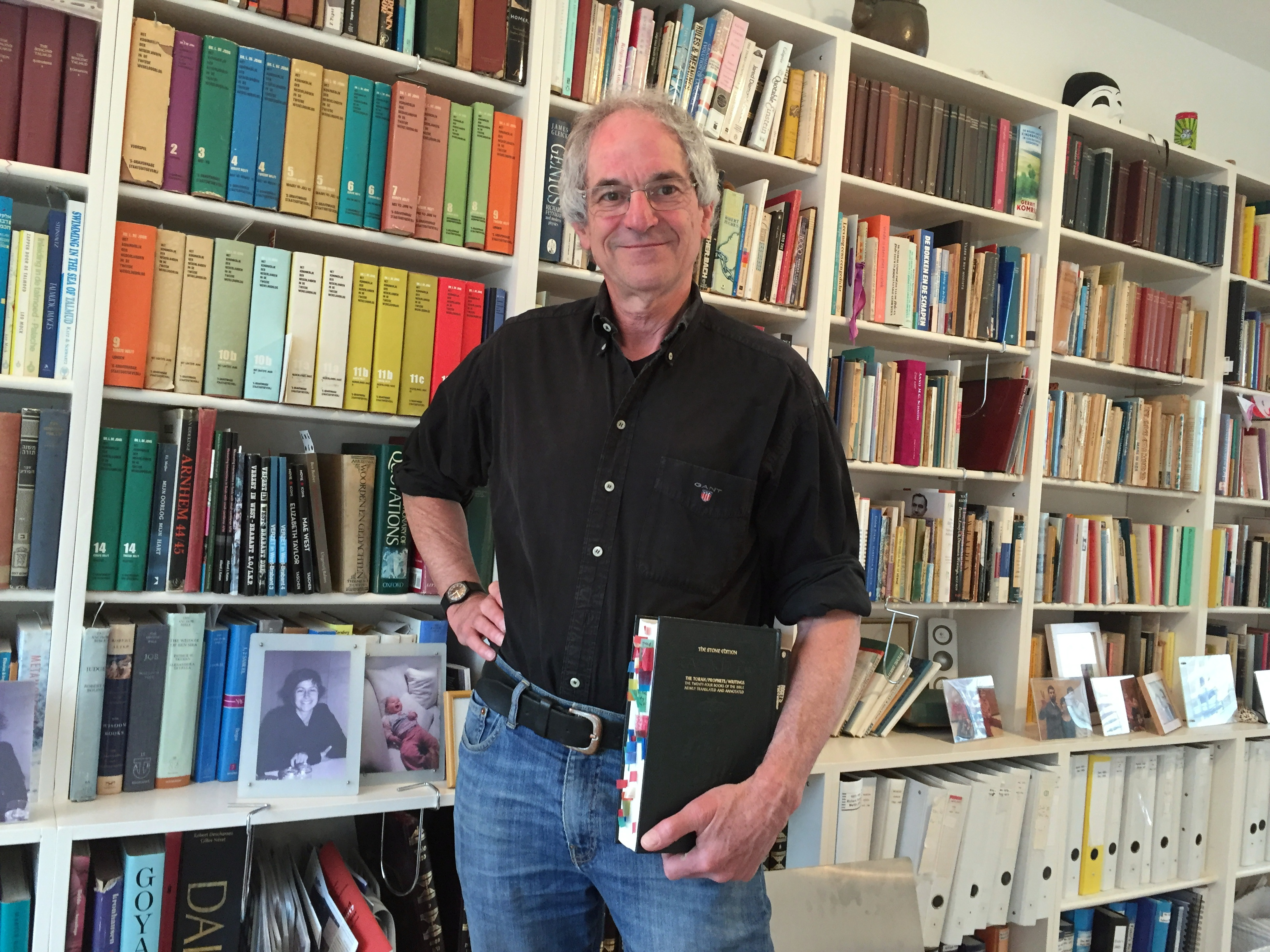 Martijn Katan